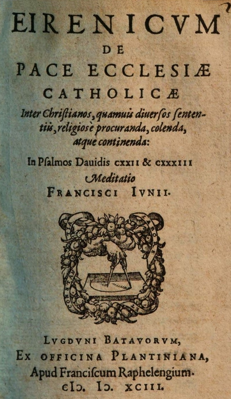 Franciscus Junius: EIRENICVM DE PACE ECCLESIAE CATHOLICAE Inter Christianos, quamuis diuersos sententiis, religiose procuranda, colenda, atque continenda: In Psalmos Dauidis CXXII & CXXXIII Meditatio („Friedensschrift über den Frieden der katholischen [=allgemeinen] Kirche, der zwischen den Christen, wie verschiedener Meinungen sie seien, fromm zu schaffen, zu pflegen und zu halten ist: Meditation über die Psalmen Davids 122 und 133“), Leiden (Lugdunum Bataviae) 1593, Titelseite